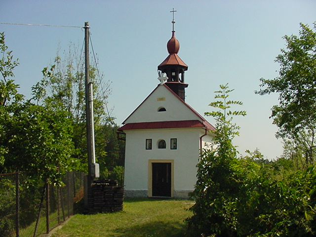 kaplička po opravě v létě 2007